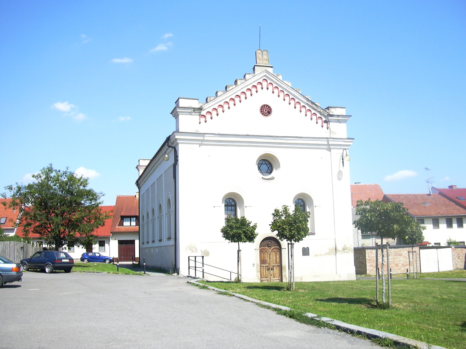 Synagoga (Slavkov u Brna- Czech republic)